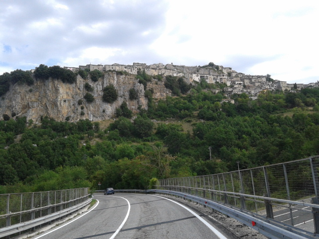 panoramica dal basso di Pietrasecca